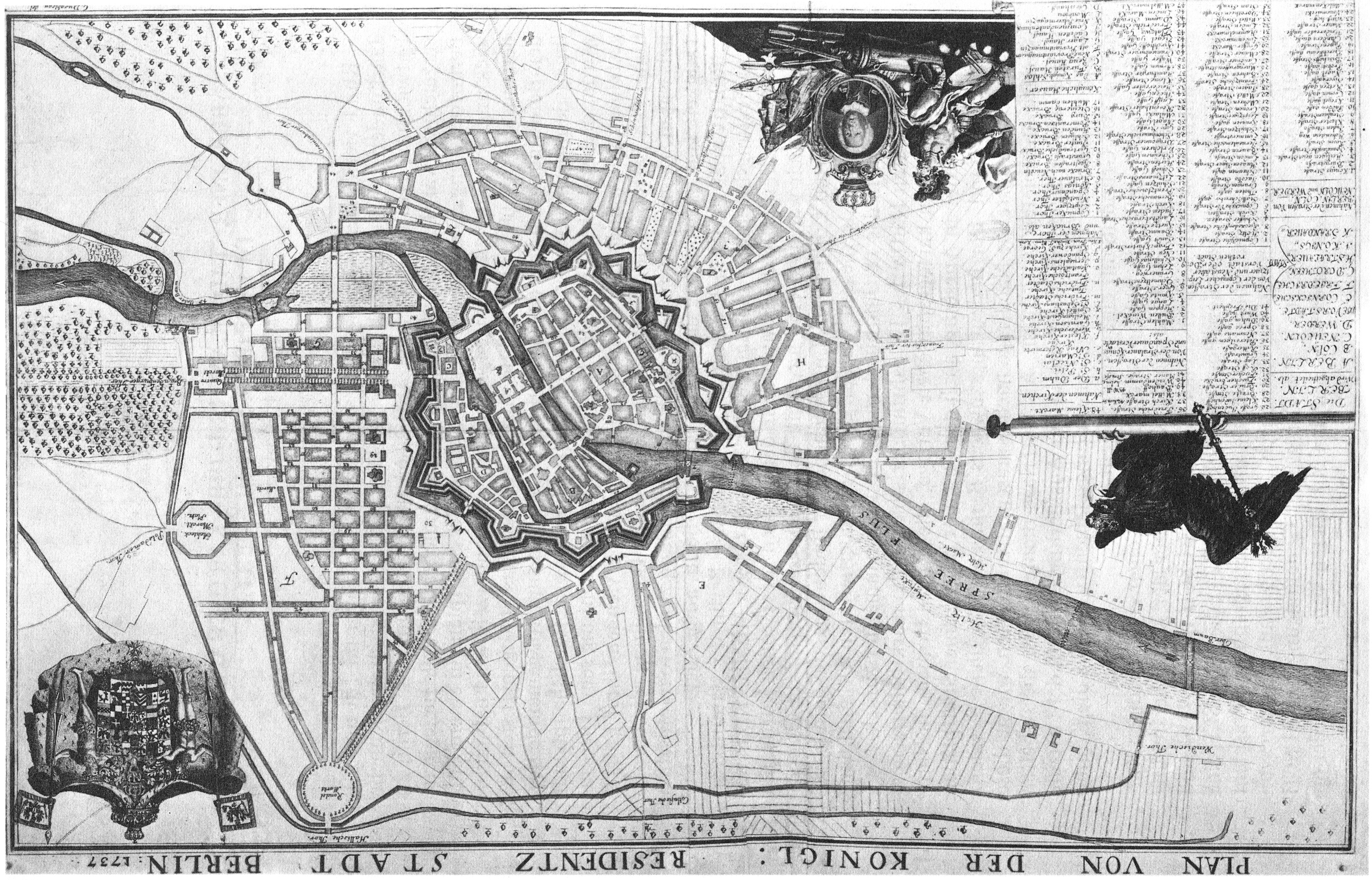 Leicht veränderte und aktualisierte Kopie des Plans von 1723. Links unten hält ein Adler eine Papierrolle mit einer Legende; rechts oben das königliche Wappen, darunter eine Windrose.